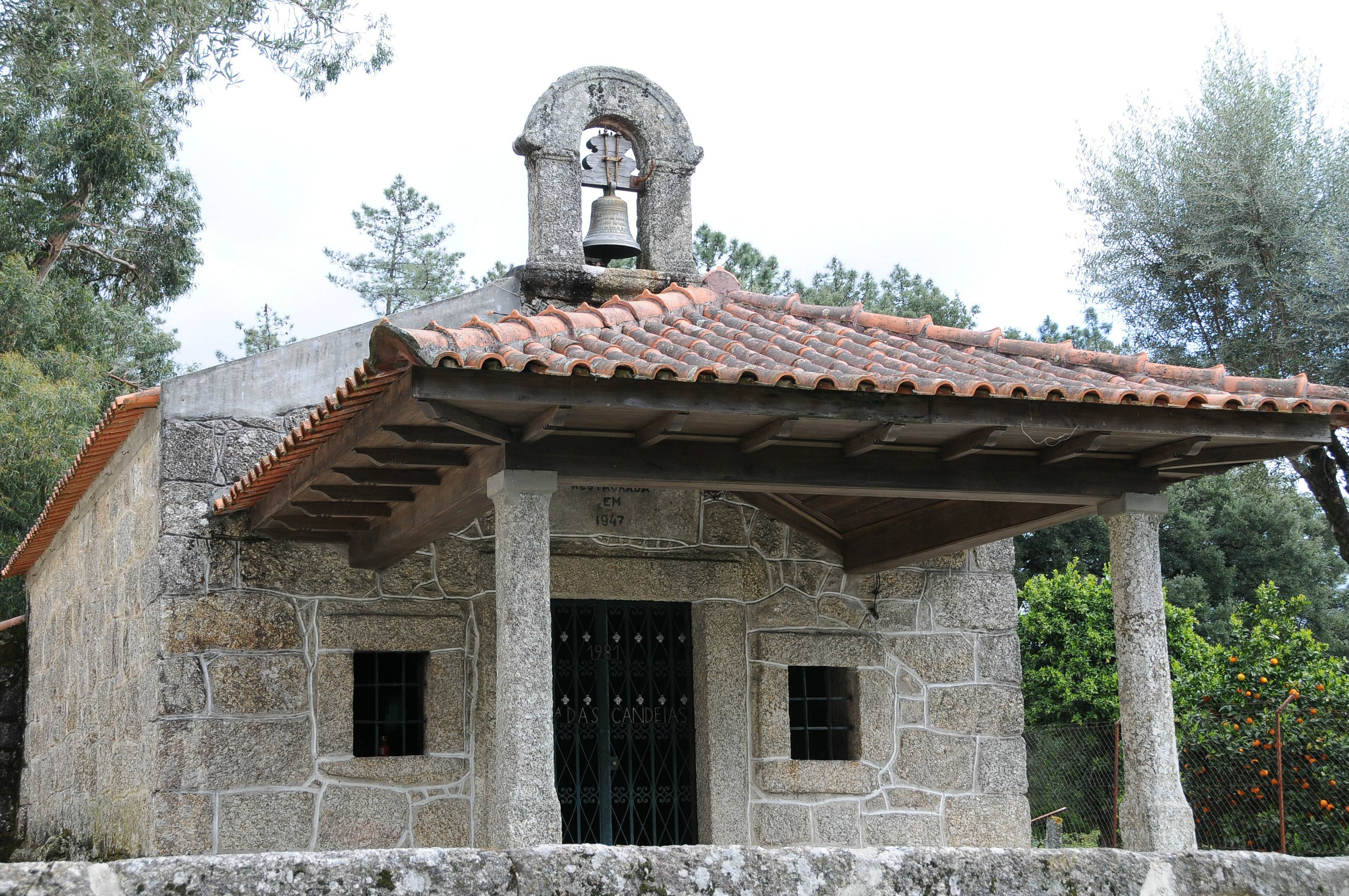 Sra das Candeias Chapel, in Tadim Braga, Portugal